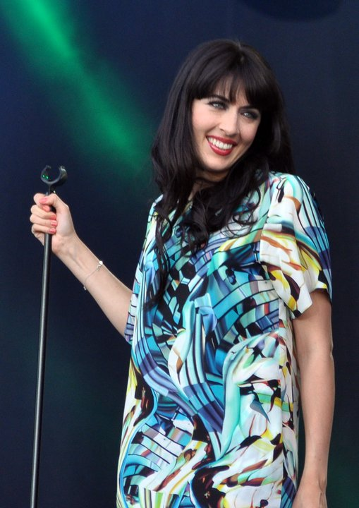 Nolwenn Leroy au concert pour l'égalité de SOS-Racisme